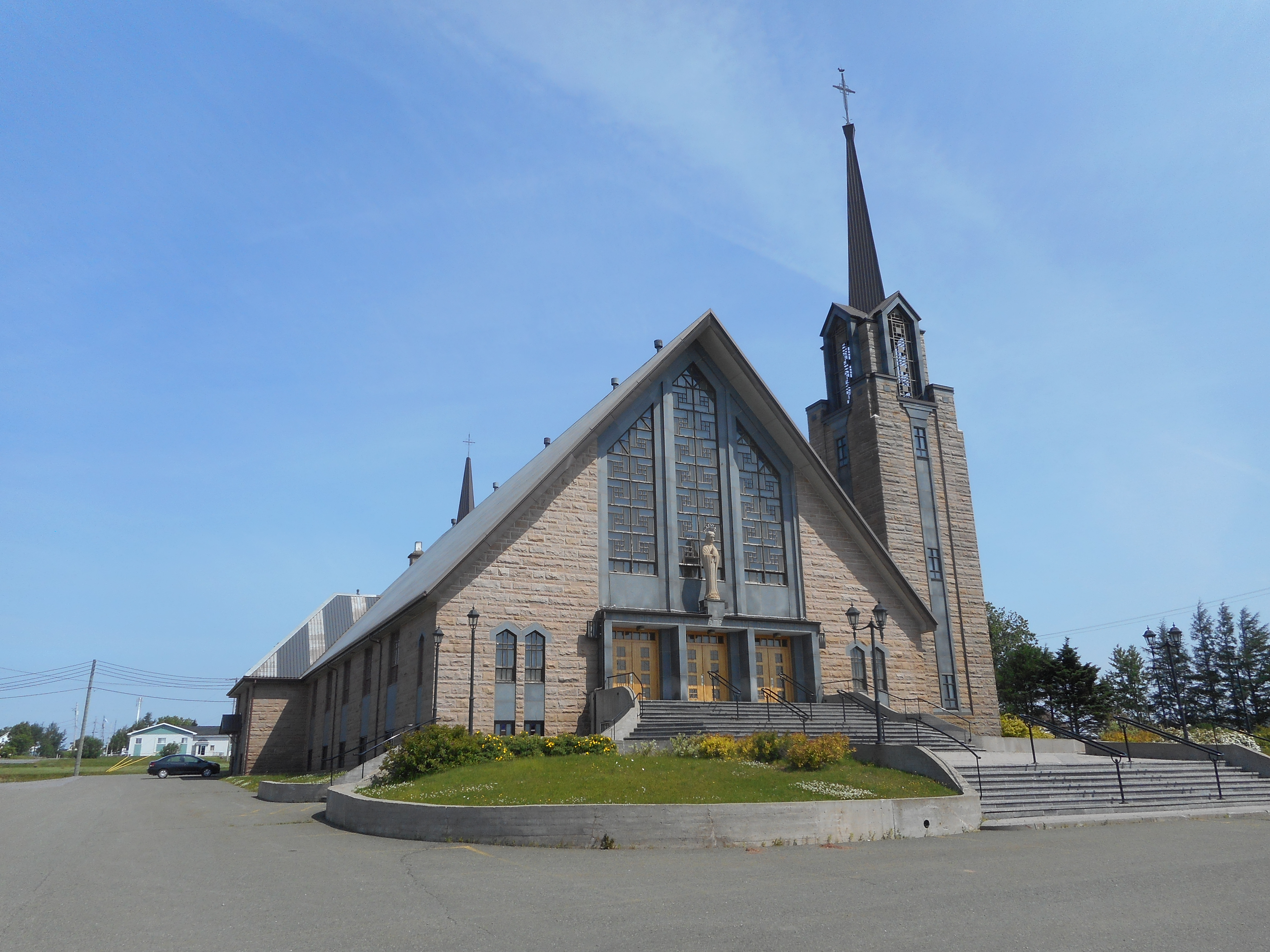 Église de Notre-Dame-de-la-Purification, boulevard Gérard-D.-Levesque Est, Paspébiac, Québec